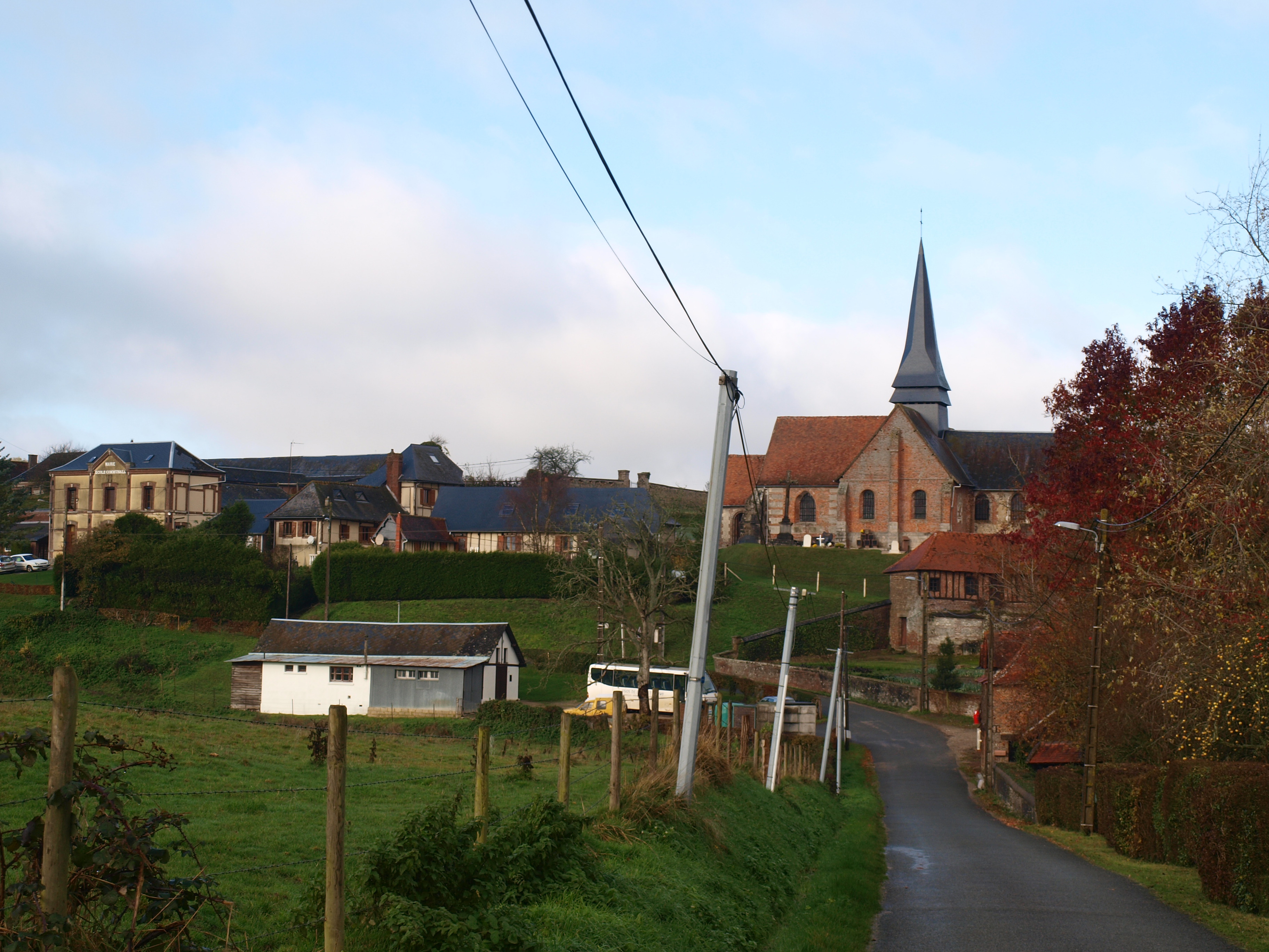 Esclavelles (Seine-Inférieure, France) ; le village : à droite l'église & à gauche la mairie